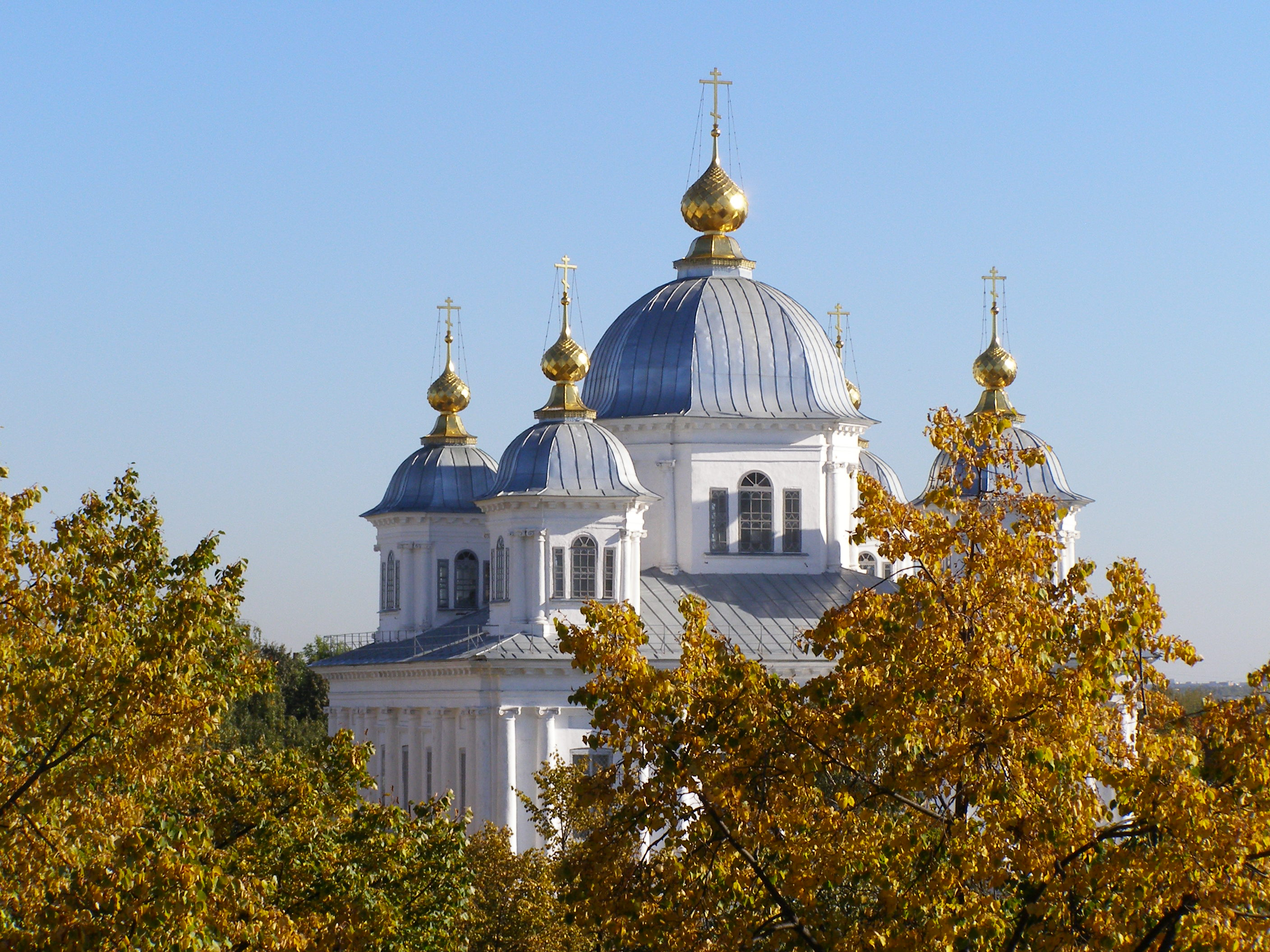 Собор Казанской иконы Божией Матери (Ярославская область, Ярославль, Первомайская улица, 19-а)